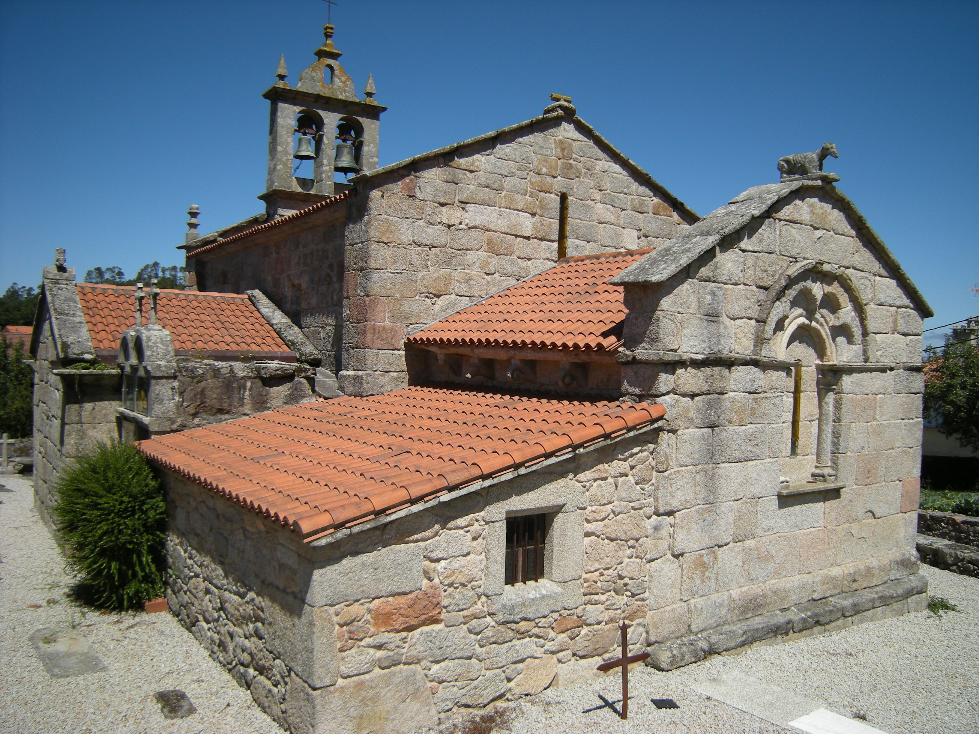 Iglesia de San Pedro de Leis de Nemancos